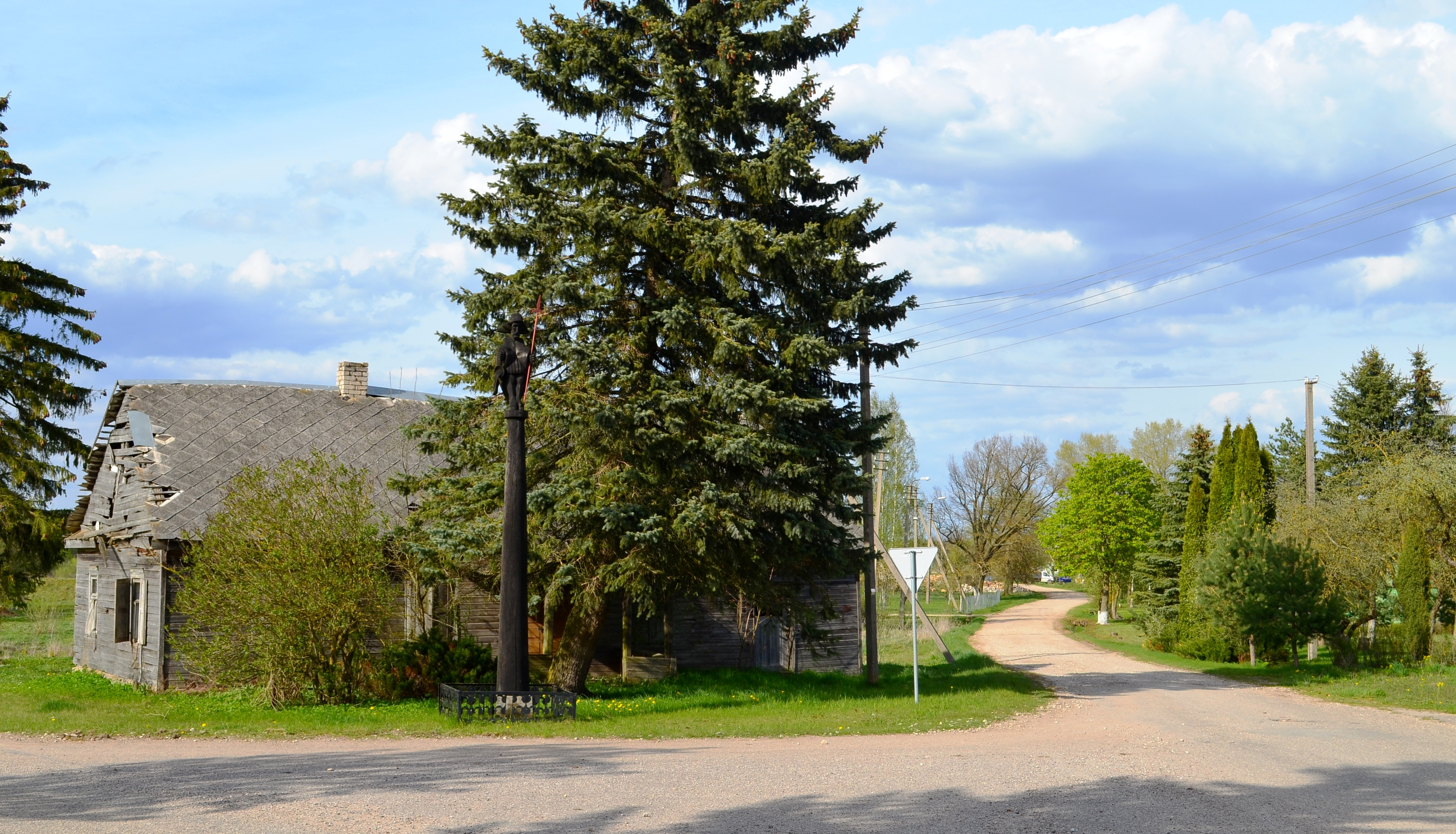 Anciškio k., Kėdainių raj.